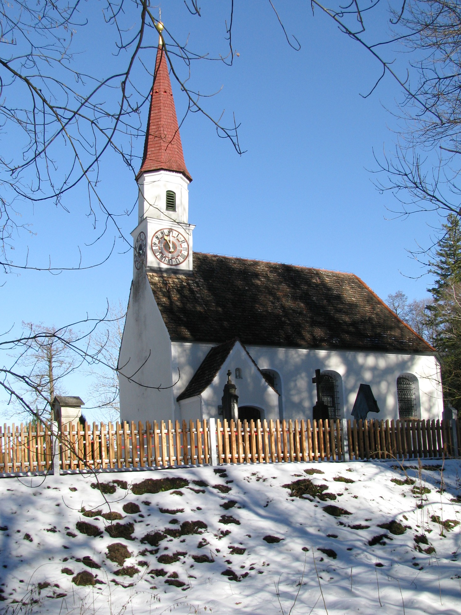 Filialkirche St. Georg in Puppling, Gemeinde Egling